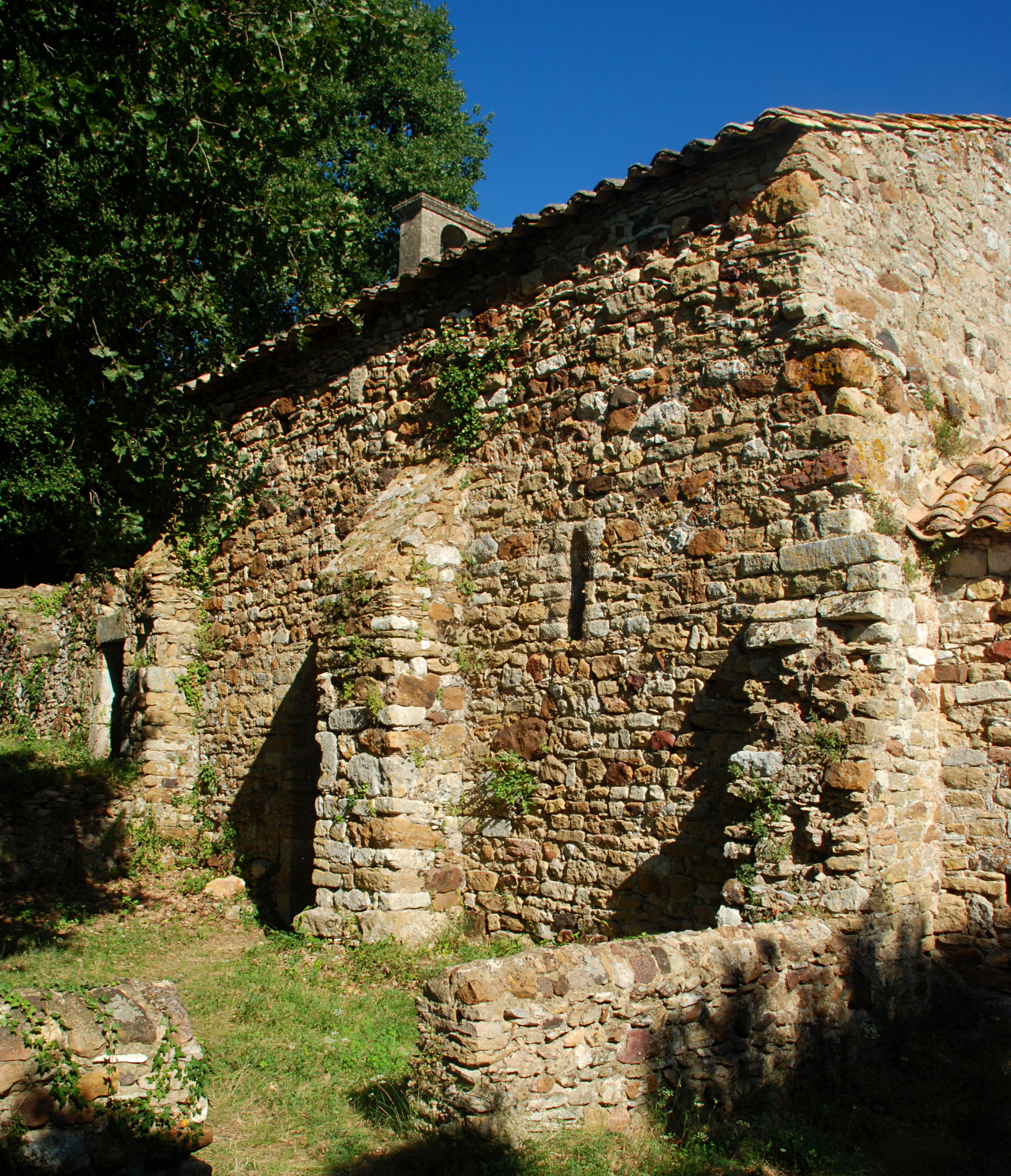 France - Gard - Chapelle Saint-Saturnin de Gaujac